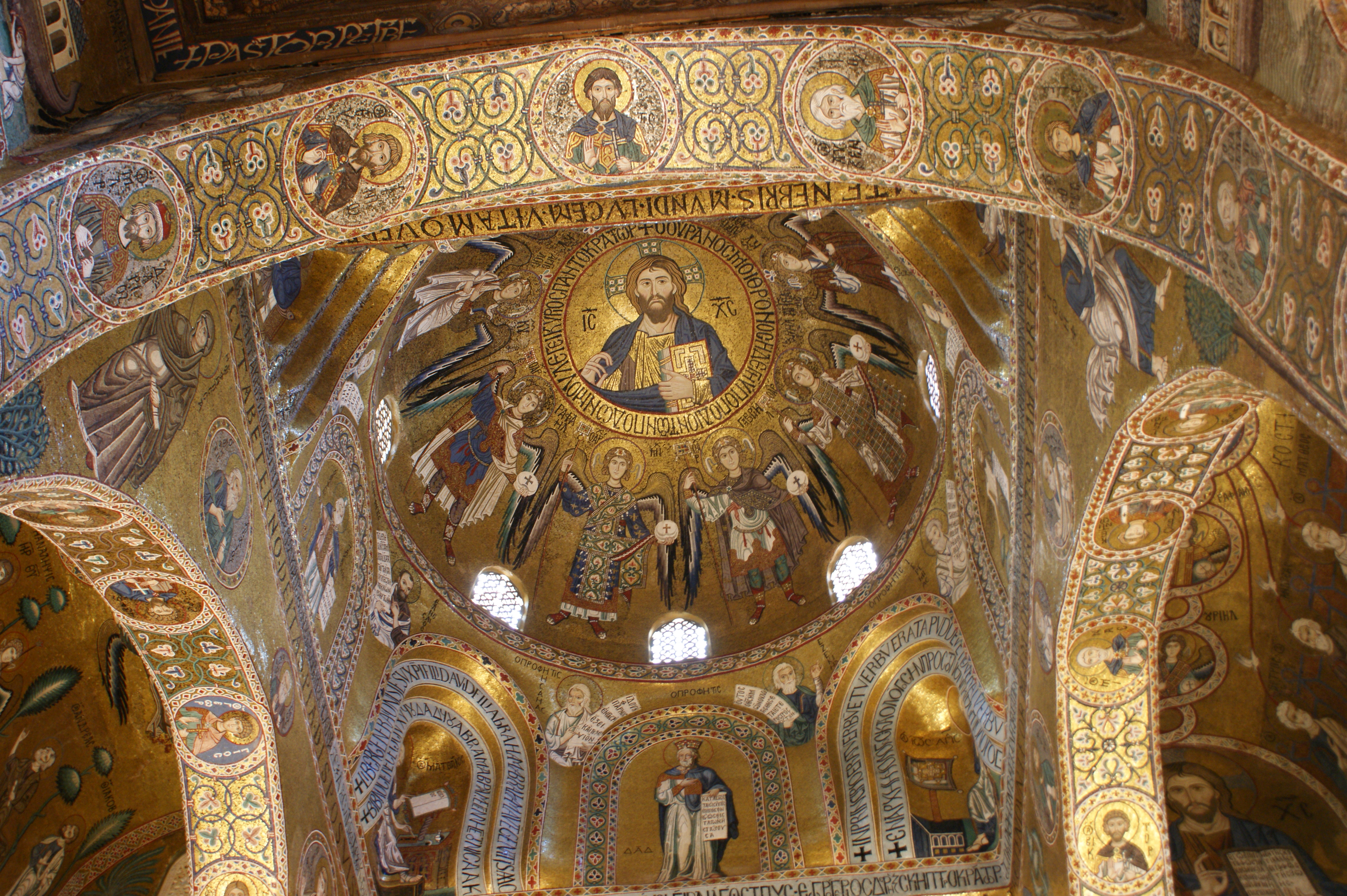 Kuppel der Capelle Palatina in Palermo (Sizilien-Italien)